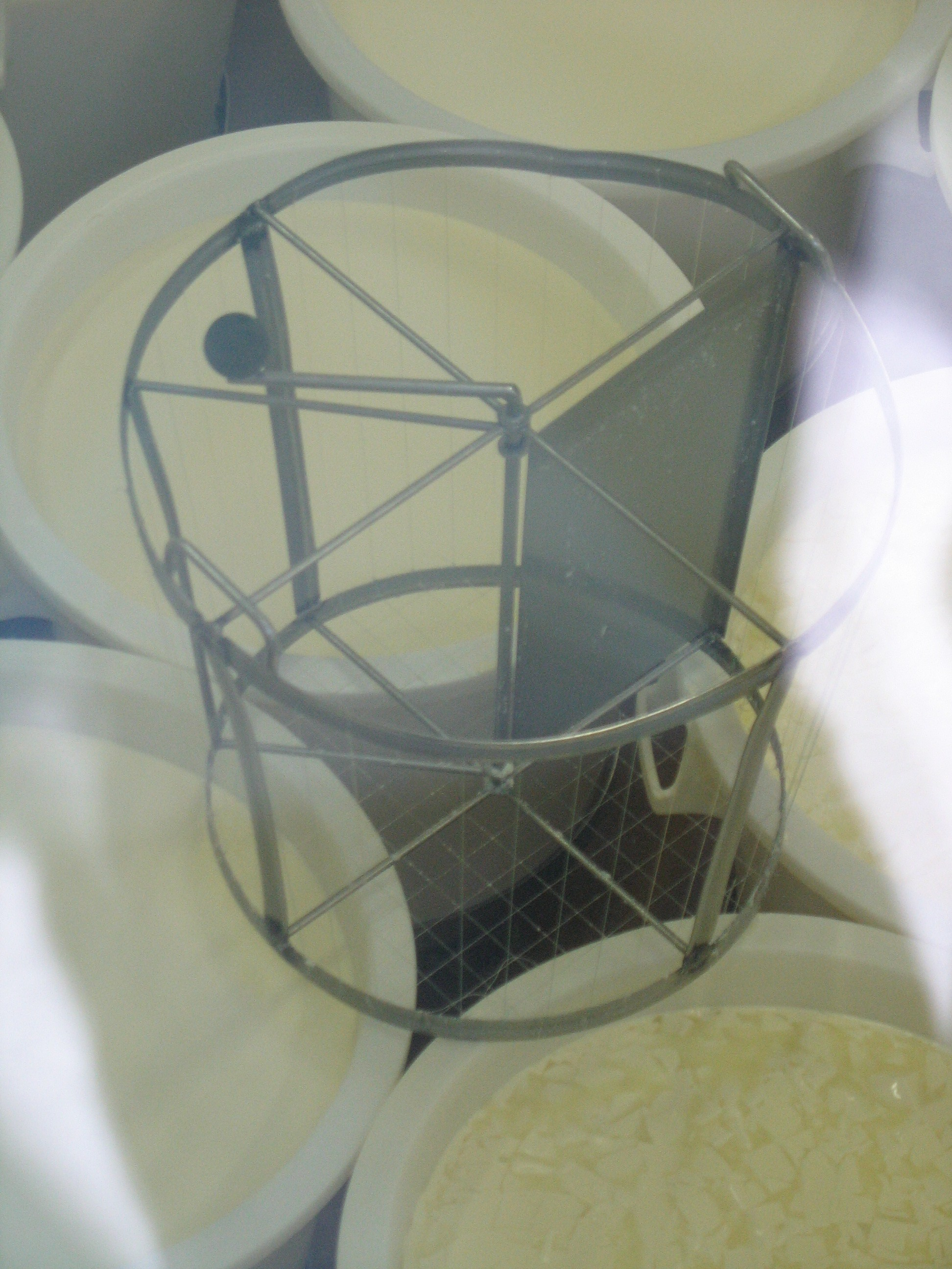 Cette photo a été prise par moi-même.